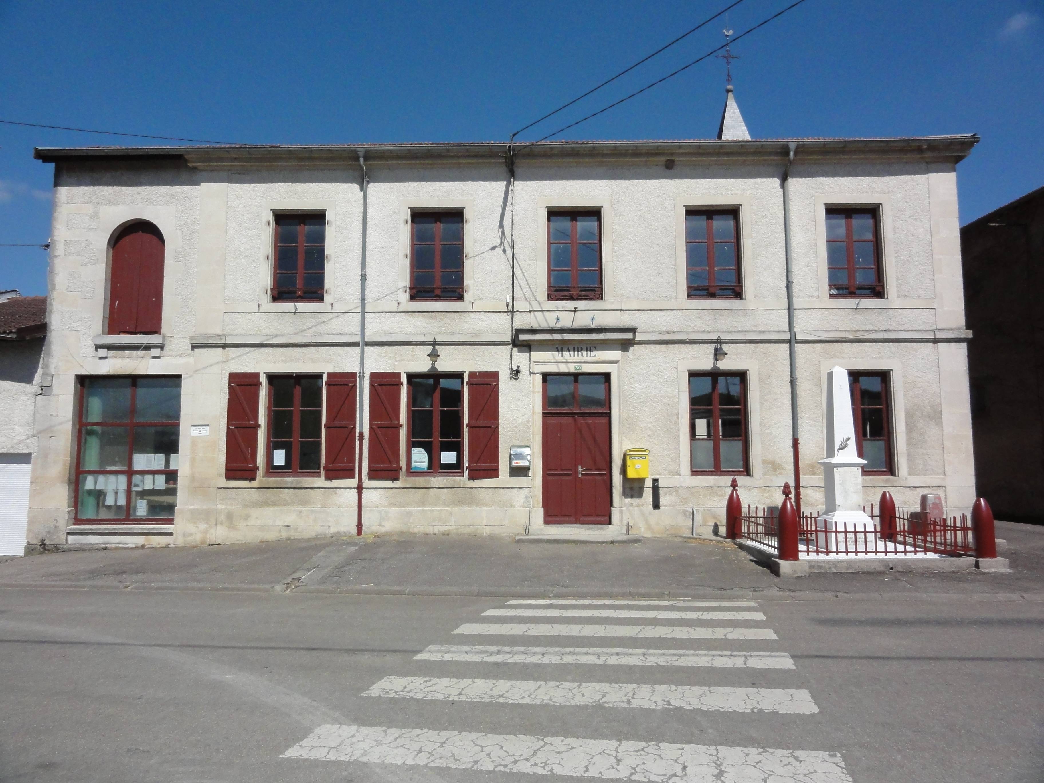 Grimaucourt-près-Sampigny (Meuse) mairie